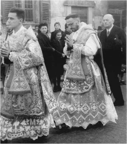 Frei Alberto no dia de sua primeira Missa. 19 de março de 1948